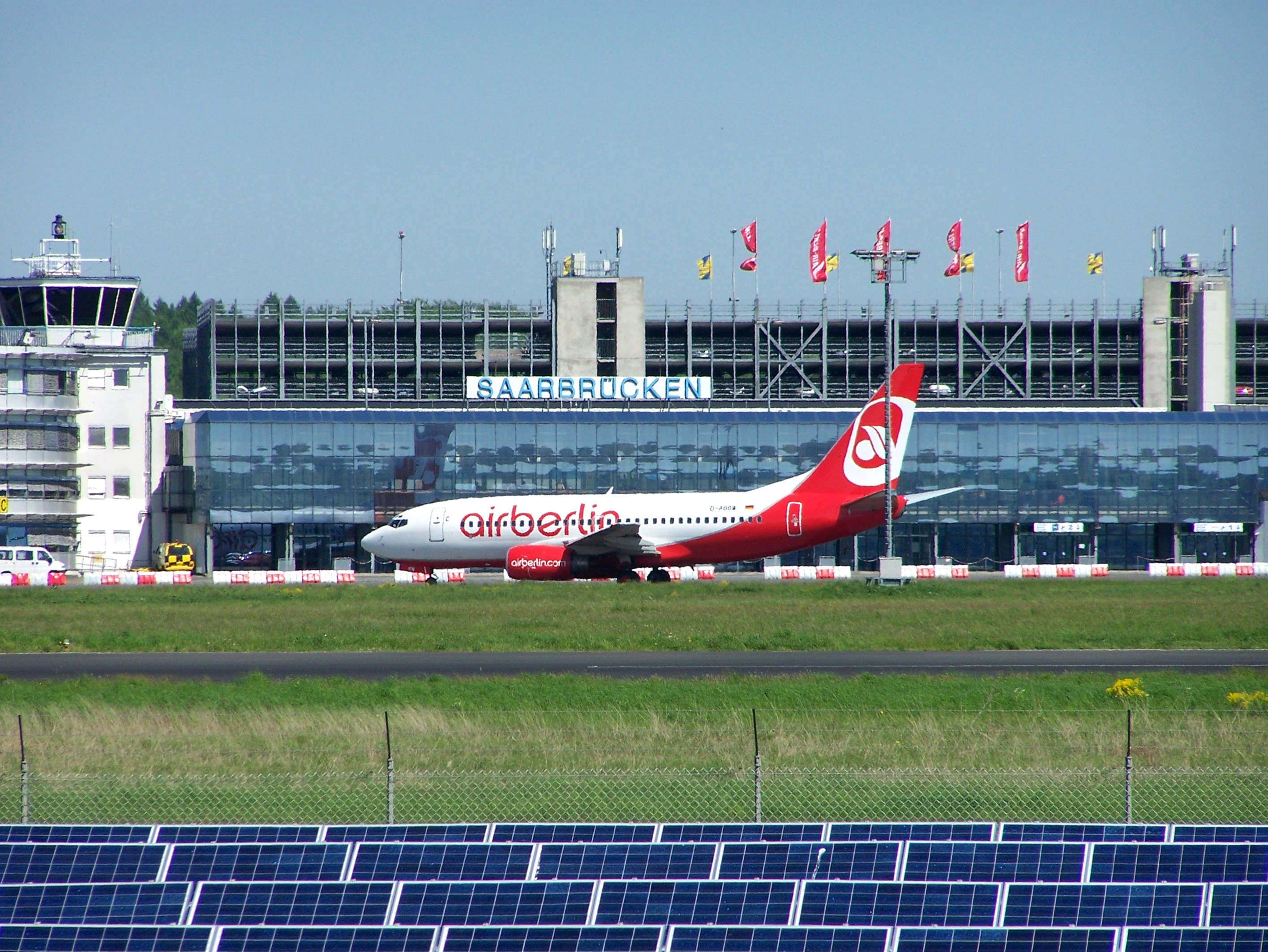 Boeing 737-700 der Air Berlin auf dem Vorfeld des Flughafens Saarbrücken vor dem Terminal Boeing 737-700 de Air Berlin à l'aéroport de Sarrebruck/Allemagne Air Berlin Boeing 737-700 in front of the terminal at the airport of Saarbrücken/Germany